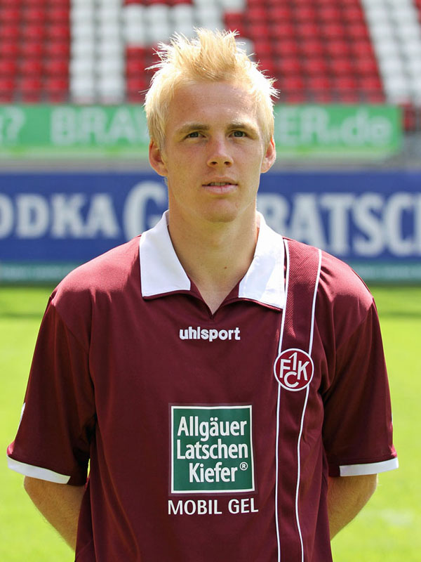 Leon Jessen, Fußballspieler